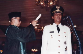 Sri Sultan HB X sedang mengucapkan sumpah jabatan sebagai Gubernur DIY periode 1998-2003 di bawah Kitab Suci Al-Quran yang dibawakan oleh rohaniawan (tampak dari depan).